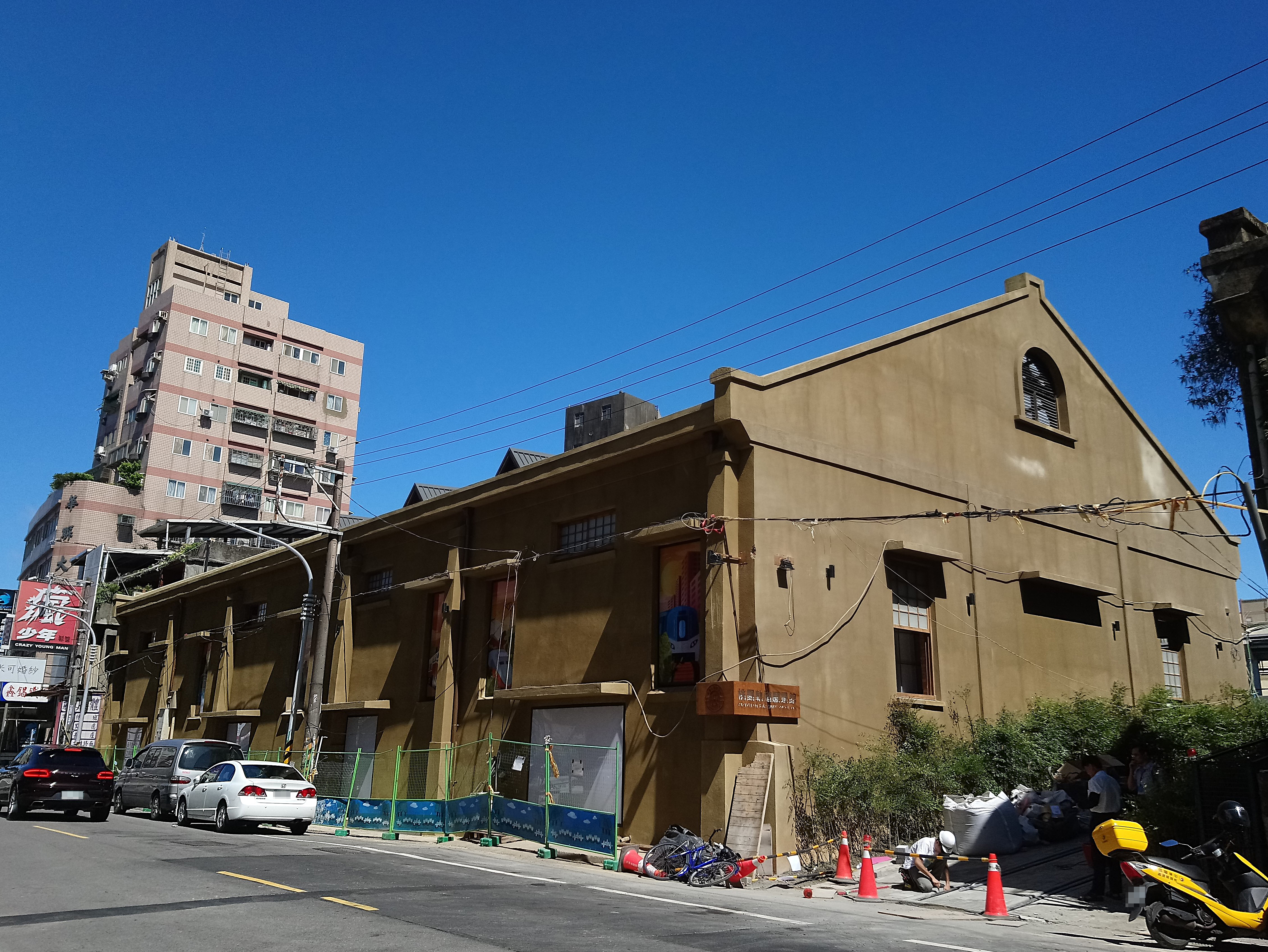 桃園軌道願景館,桃園市桃園區市中次分區武陵里